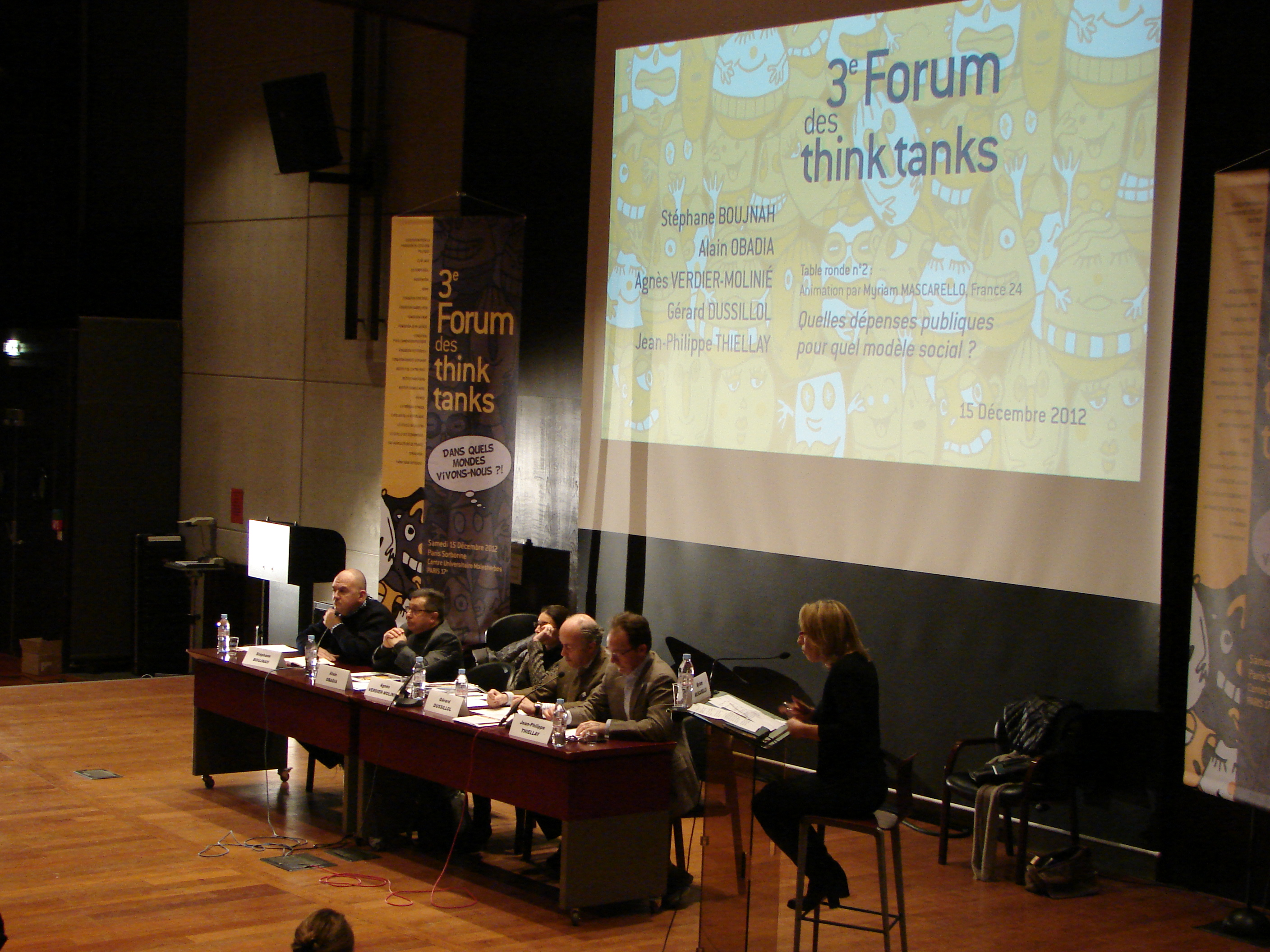 3e forum des Think tanks en France